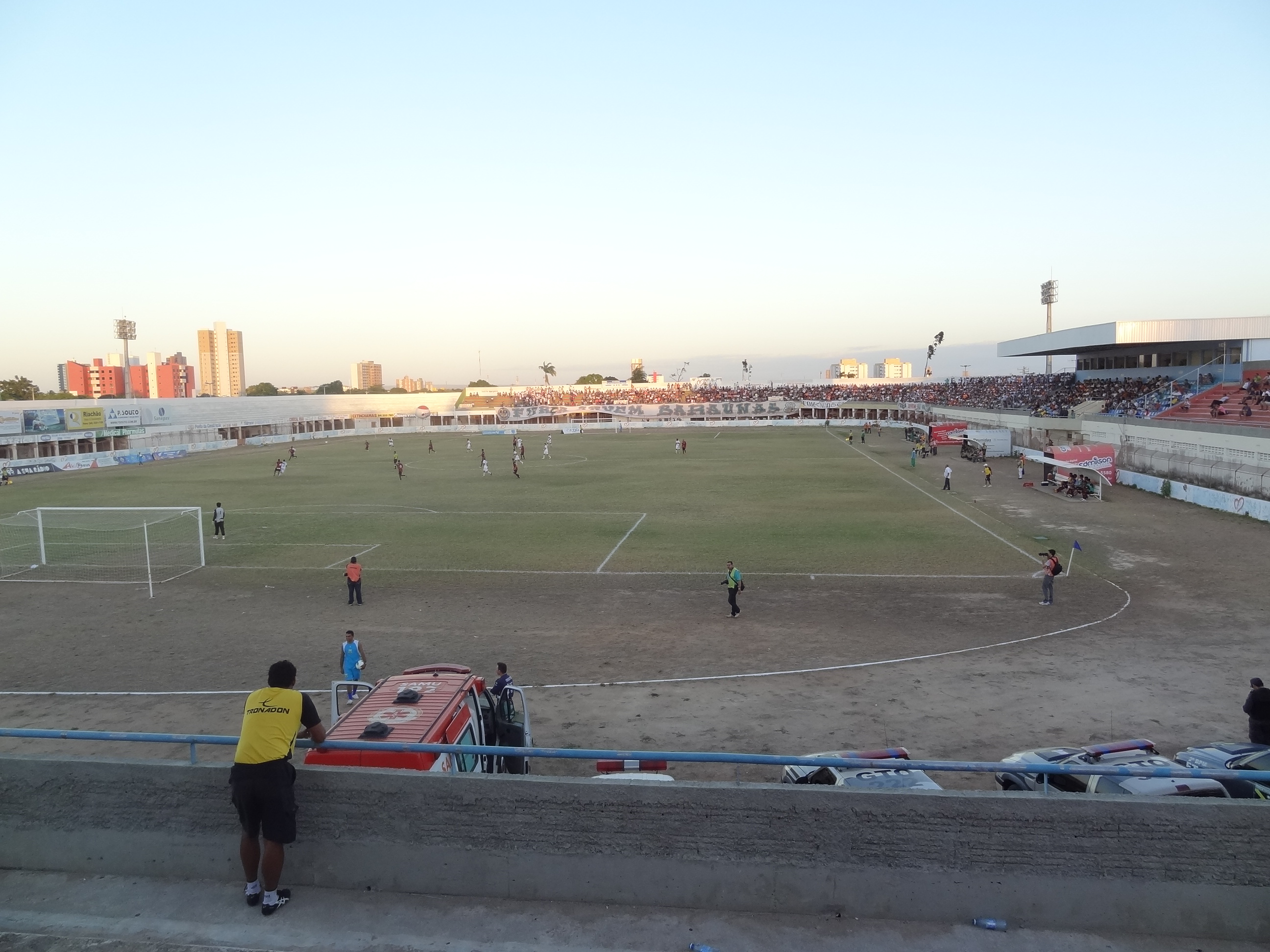 Jogo da Série D 2012 contra o Campinense-PB.